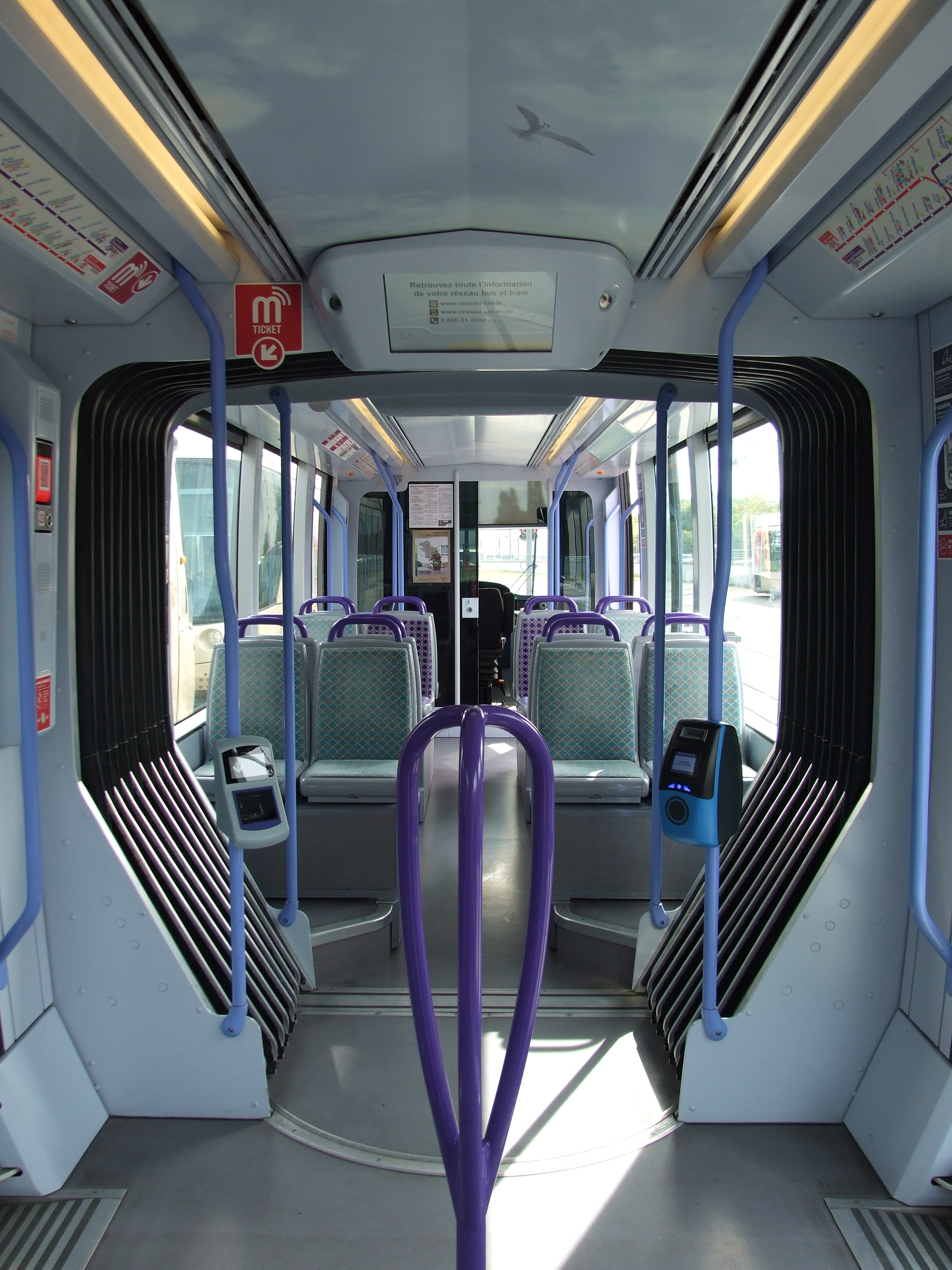 Intérieur du Citadis 302 n°77 du réseau d'Orléans. Ambiance Trendy avec valideur V6000 et M'Ticket